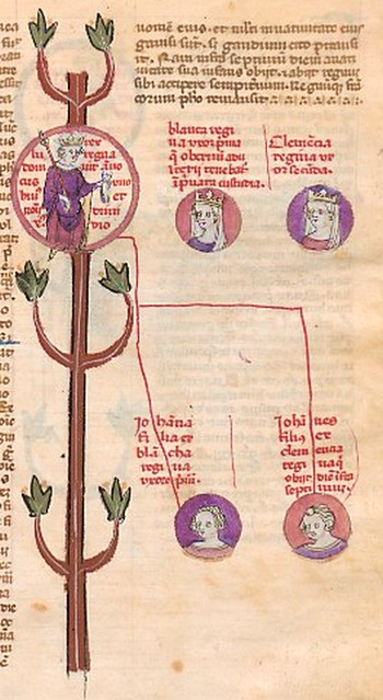 Arbre généalogique